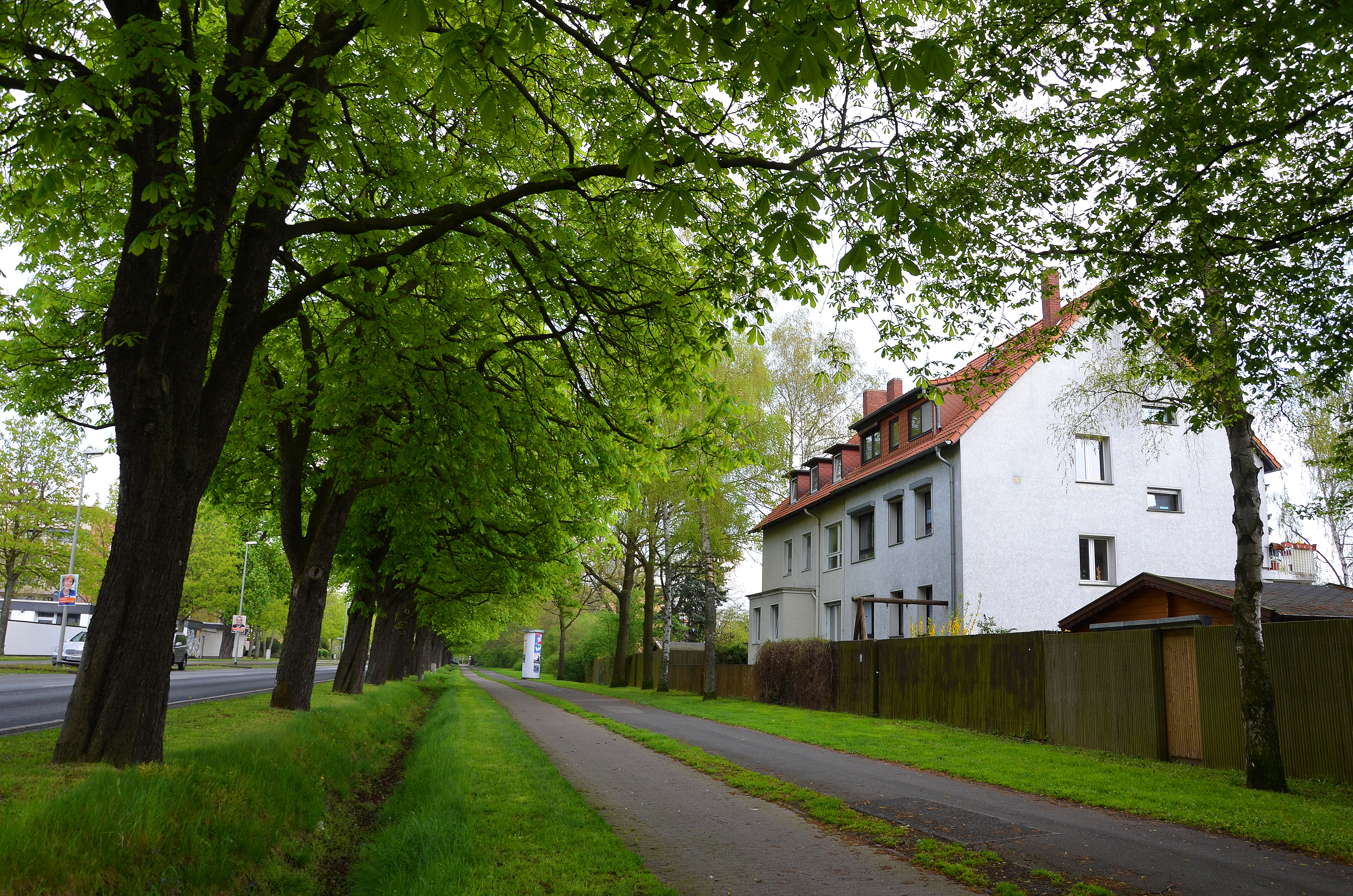 Impressionen rund um den Burgdorfer Damm 63 und der Misburger Straße in Hannover, dem ehemaligen Wohnsitz der Künstlerin Käte Ledig-Schön ...